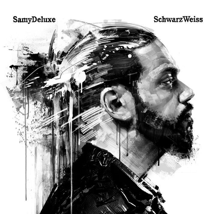 Cover des Albums „SchwarzWeiss“